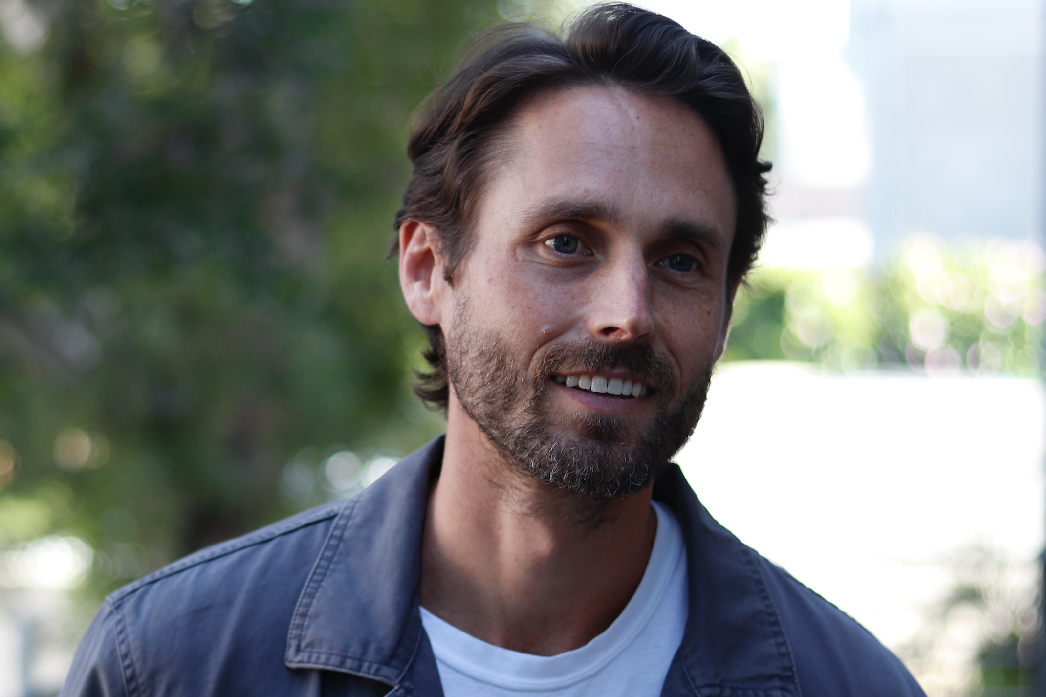 Hans Christopher a Sundance